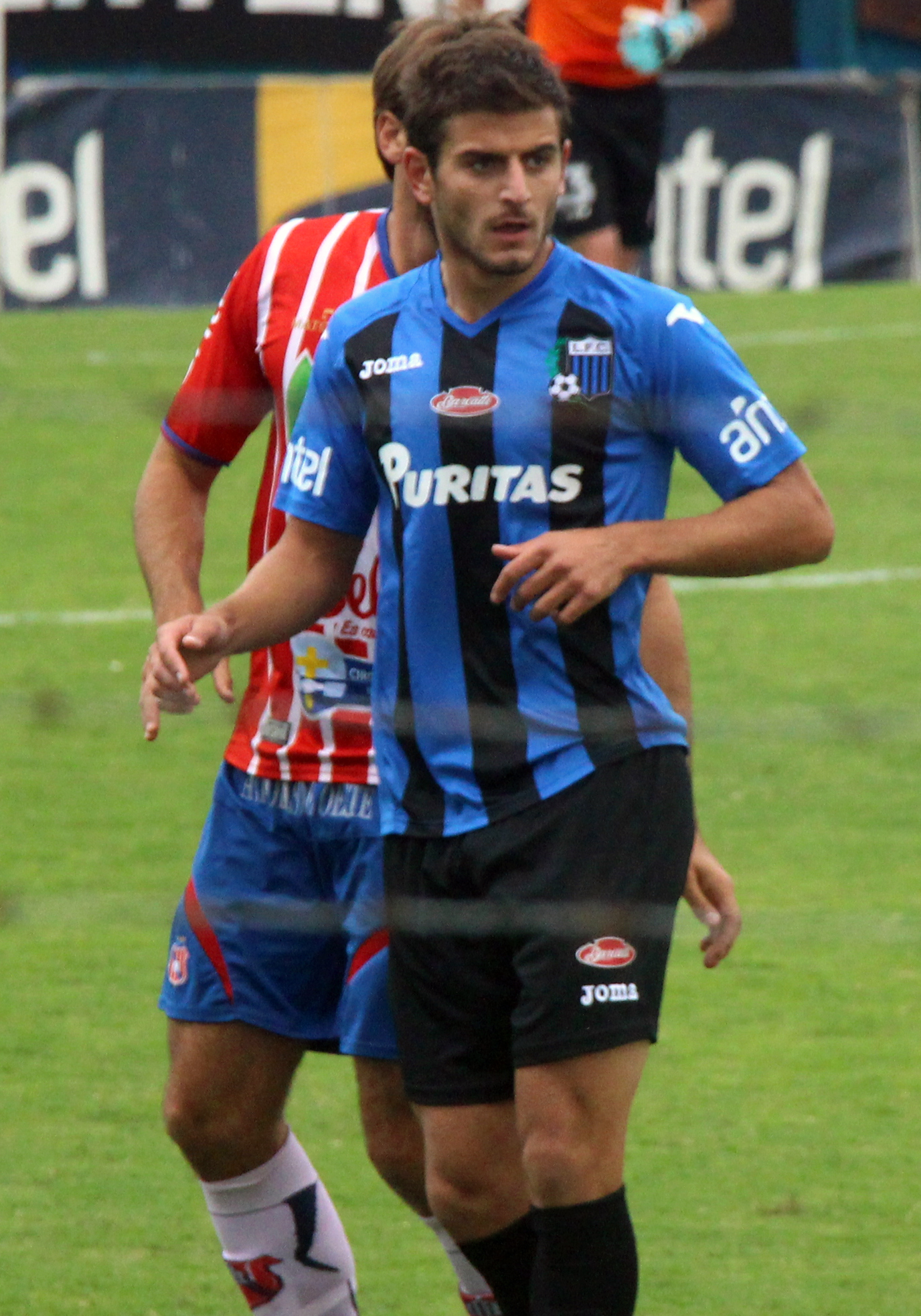 Max frente a Central Español por la 7ma fecha del Torneo Clausura 2013